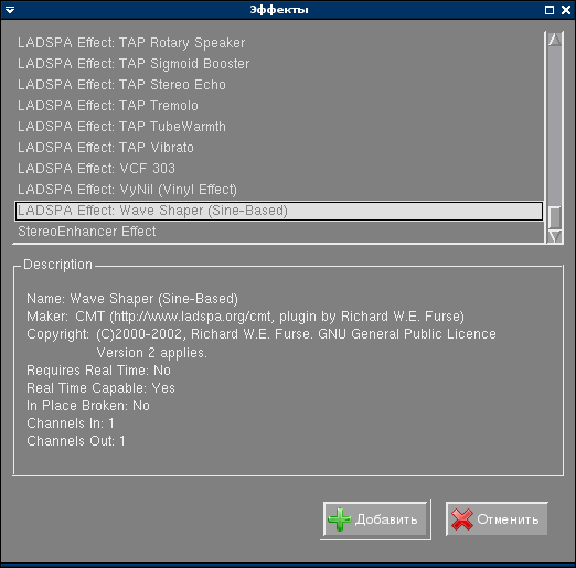 Эффекты в LMMS